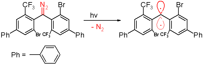 Persistent triplet carbene